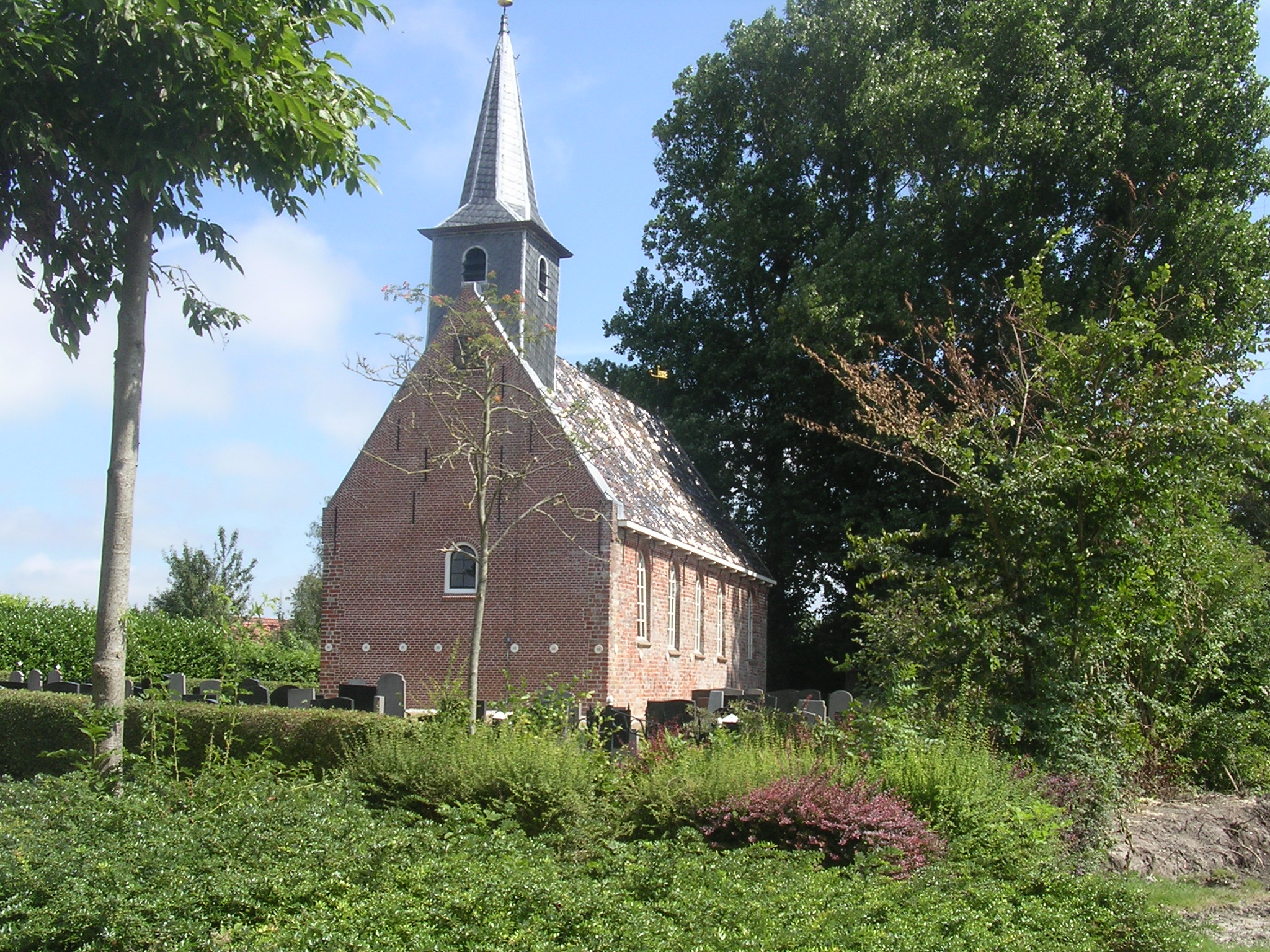 Nijewier Herfoarme Tsjerke